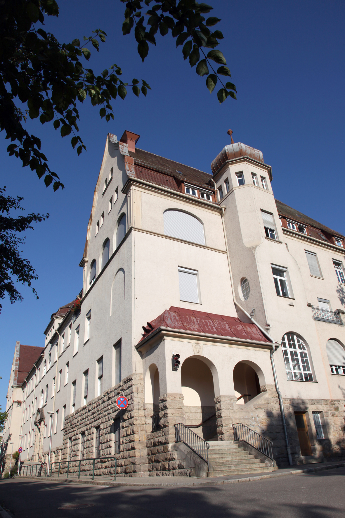 Universitäts-Augenklinik Tübingen